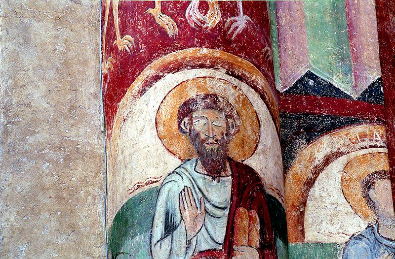 cycle peint de la nef (les manifestations de Dieu dans le monde)